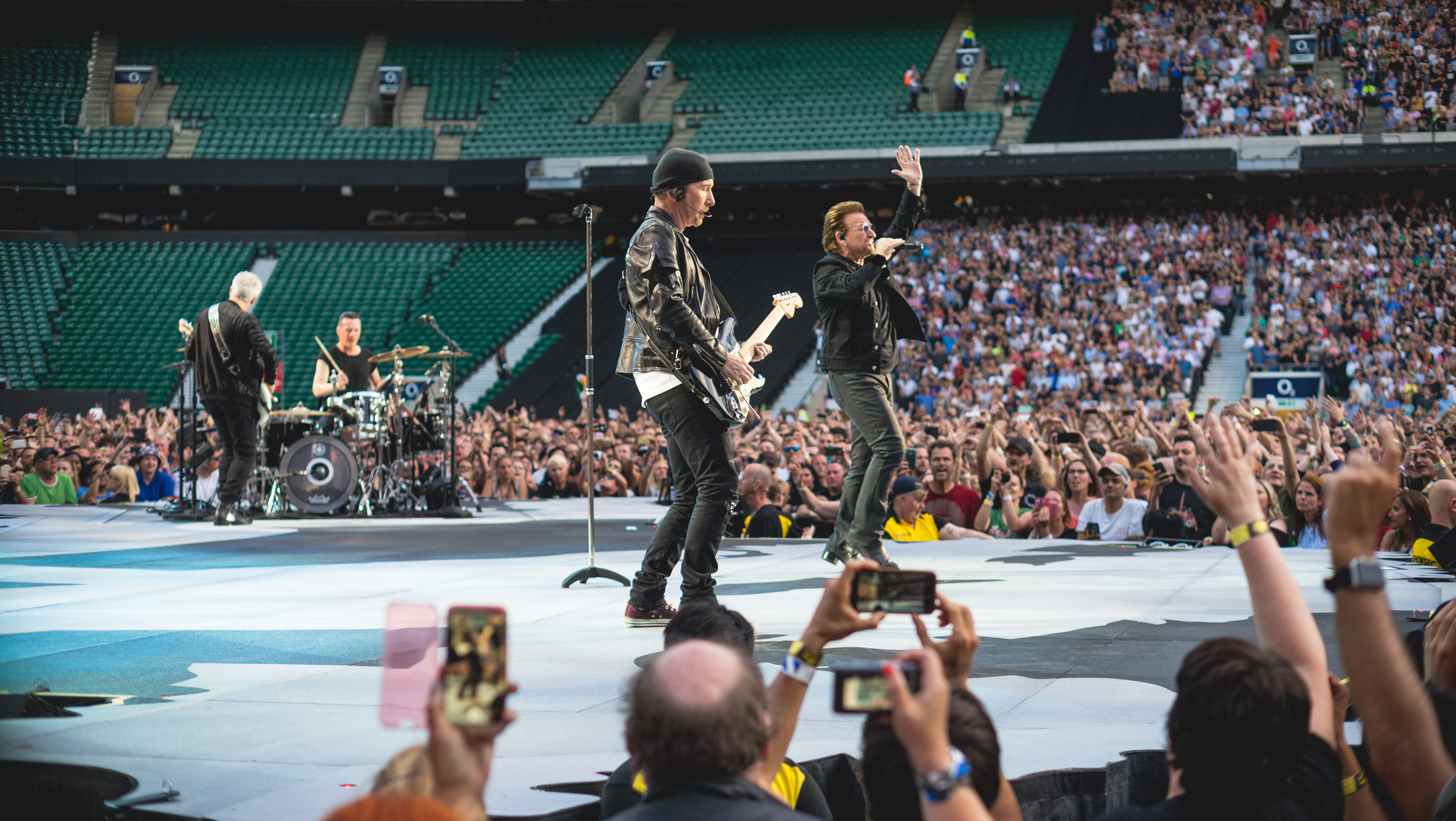 U2Twick090717-14